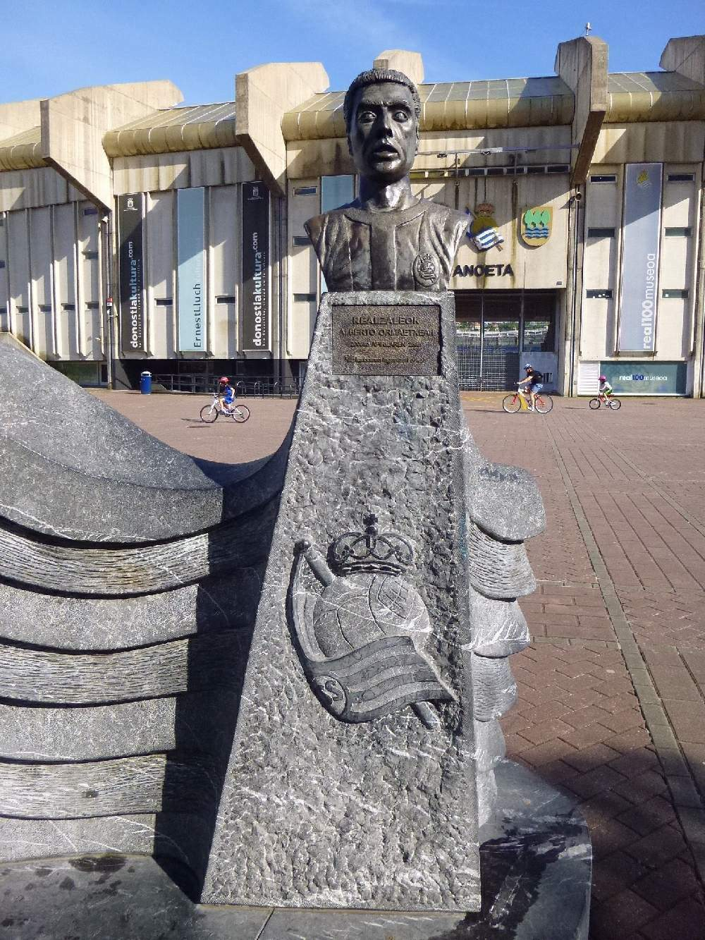 San Sebastián - Estadio de Anoeta